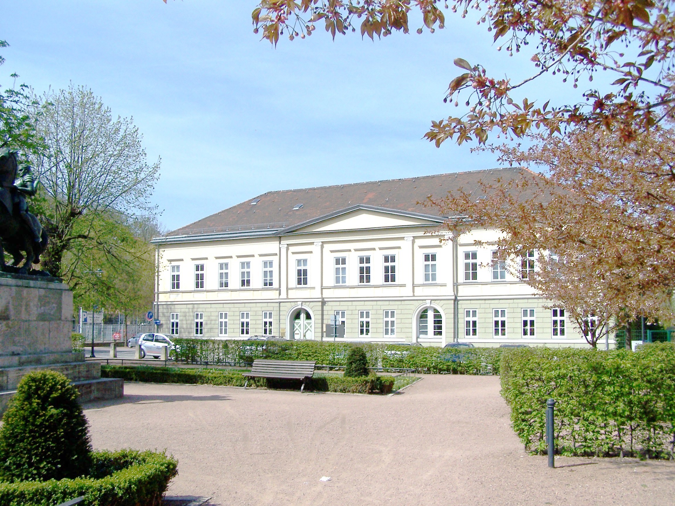 Bechtholzheimsches Palais in Eisenach